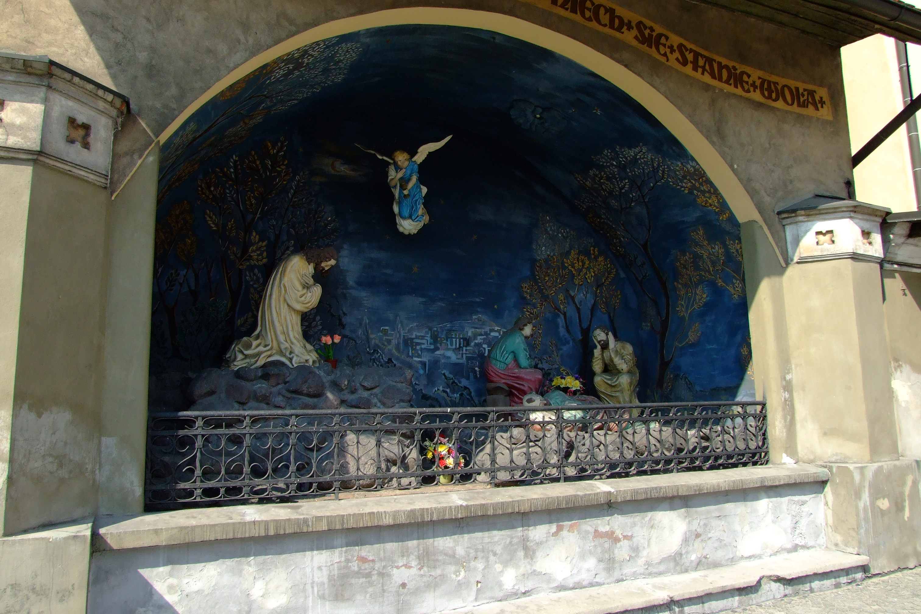 Obejście kościoła św. Mikołaja w Pyskowicach